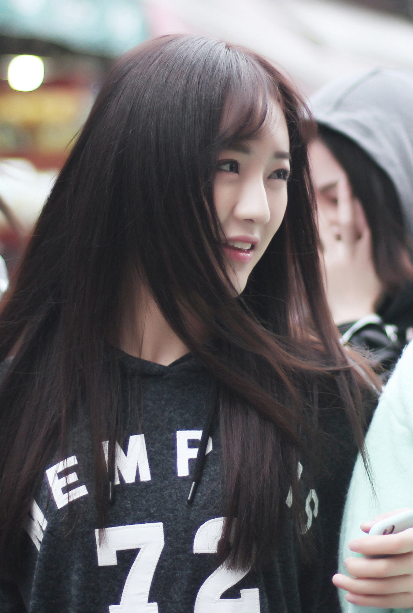 161012 嘉兴路饭拍5p 莫寒